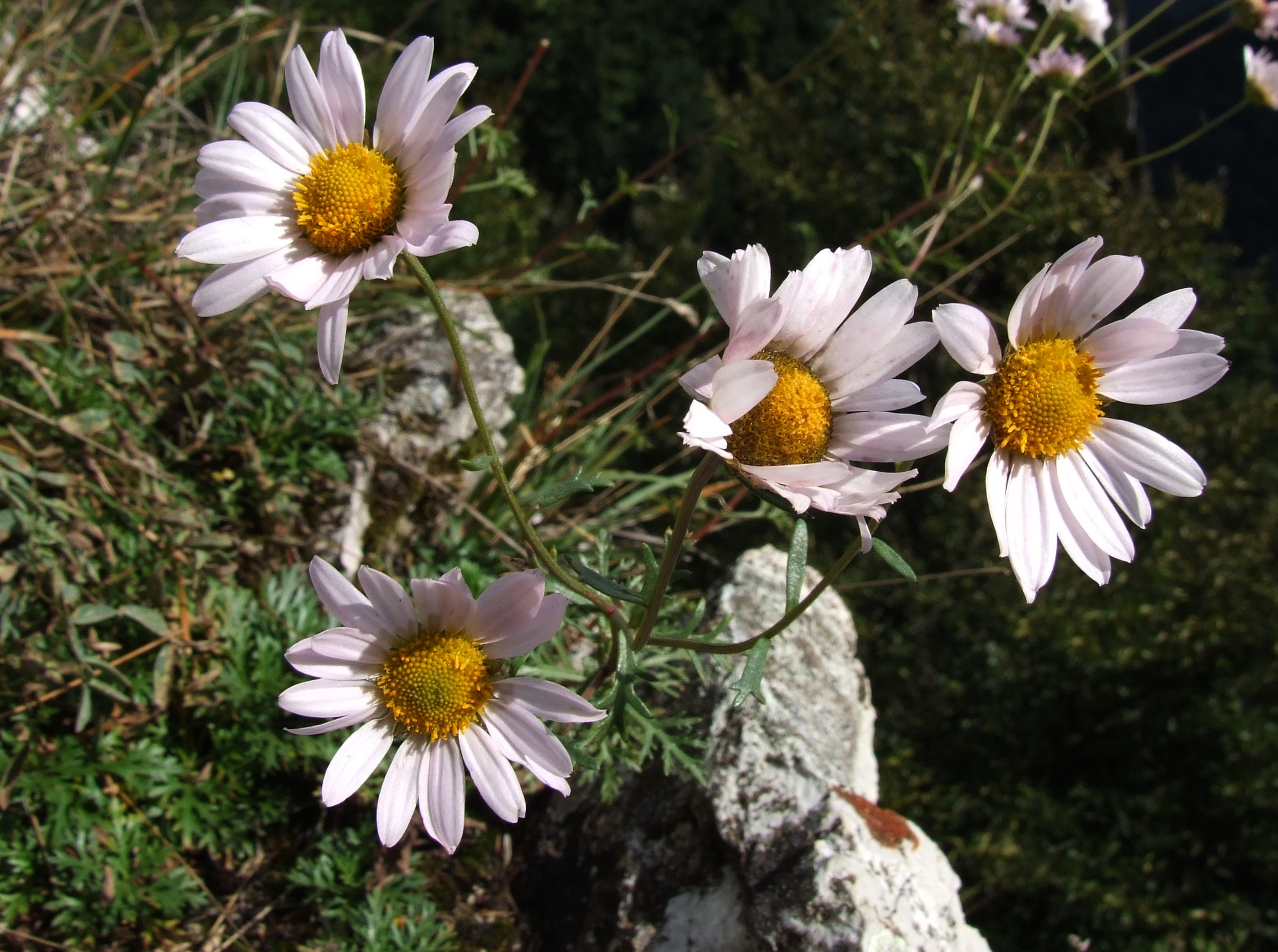 Złocień zawadzkiego (Dendranthema zawadskii) na szczycie Trzech Koron (Pieniny)